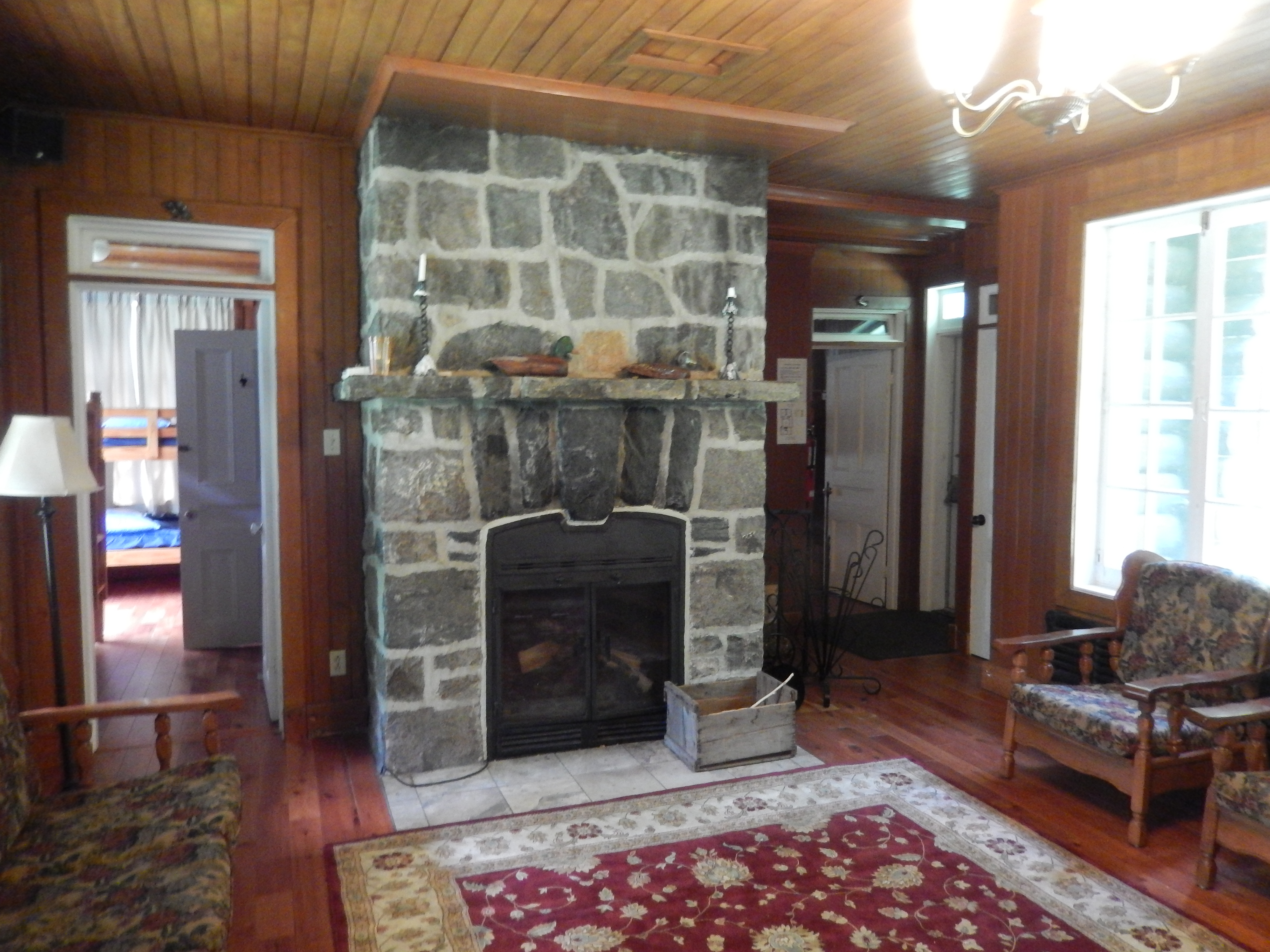 Maison Andrew en juillet 2017.